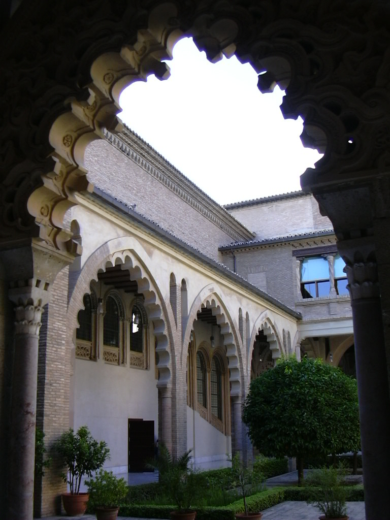 La Aljafería - Patio de Santa Isabel